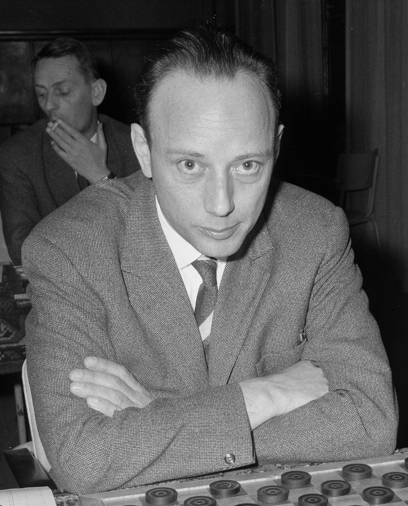 Kampioenschap dammen van Nederland 1964, in restaurant De Kroon te Amsterdam, drs. P. Roozenburg voor de strijd